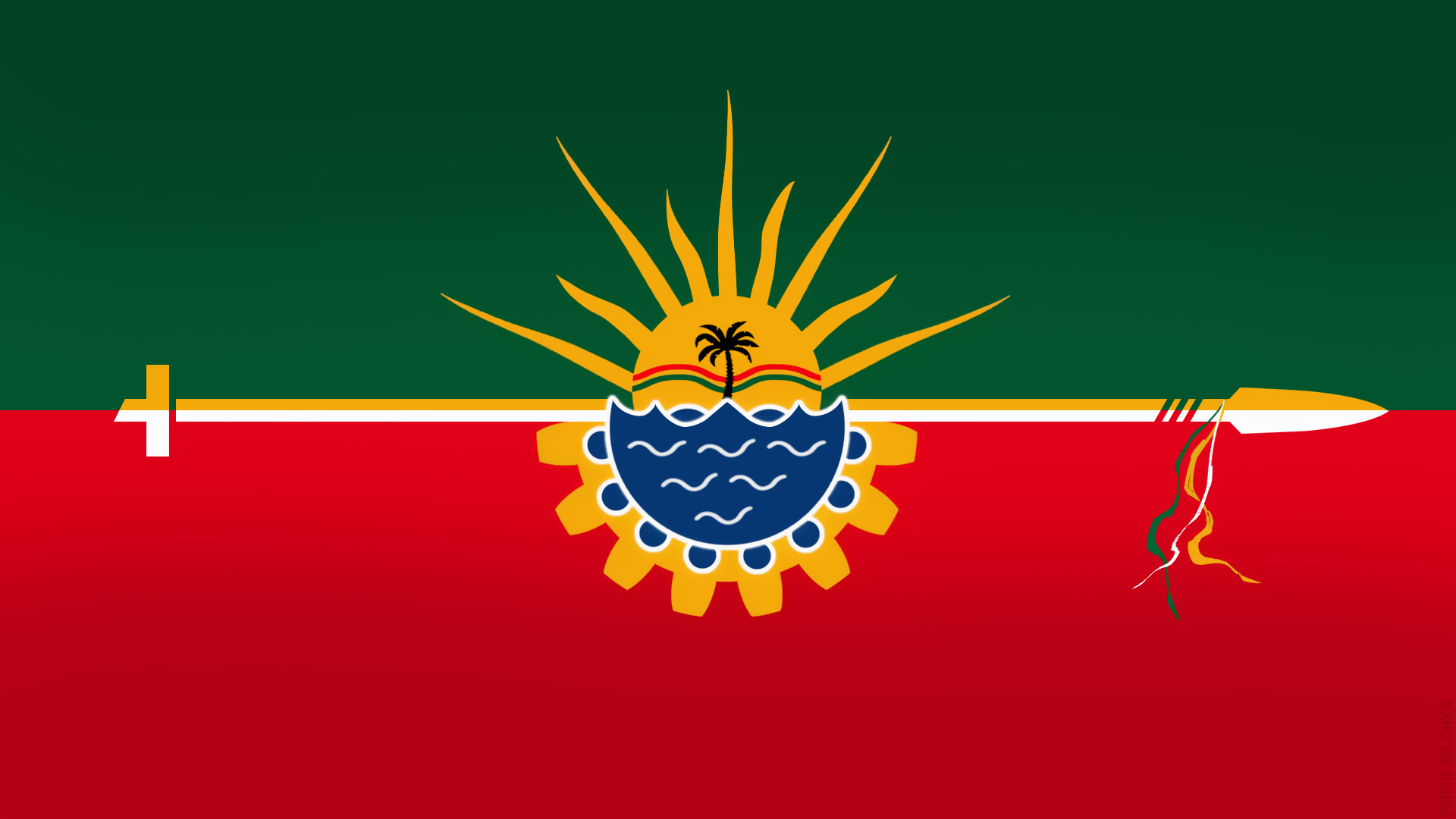 Bandera de la ciudad de Concordia, Entre Rios